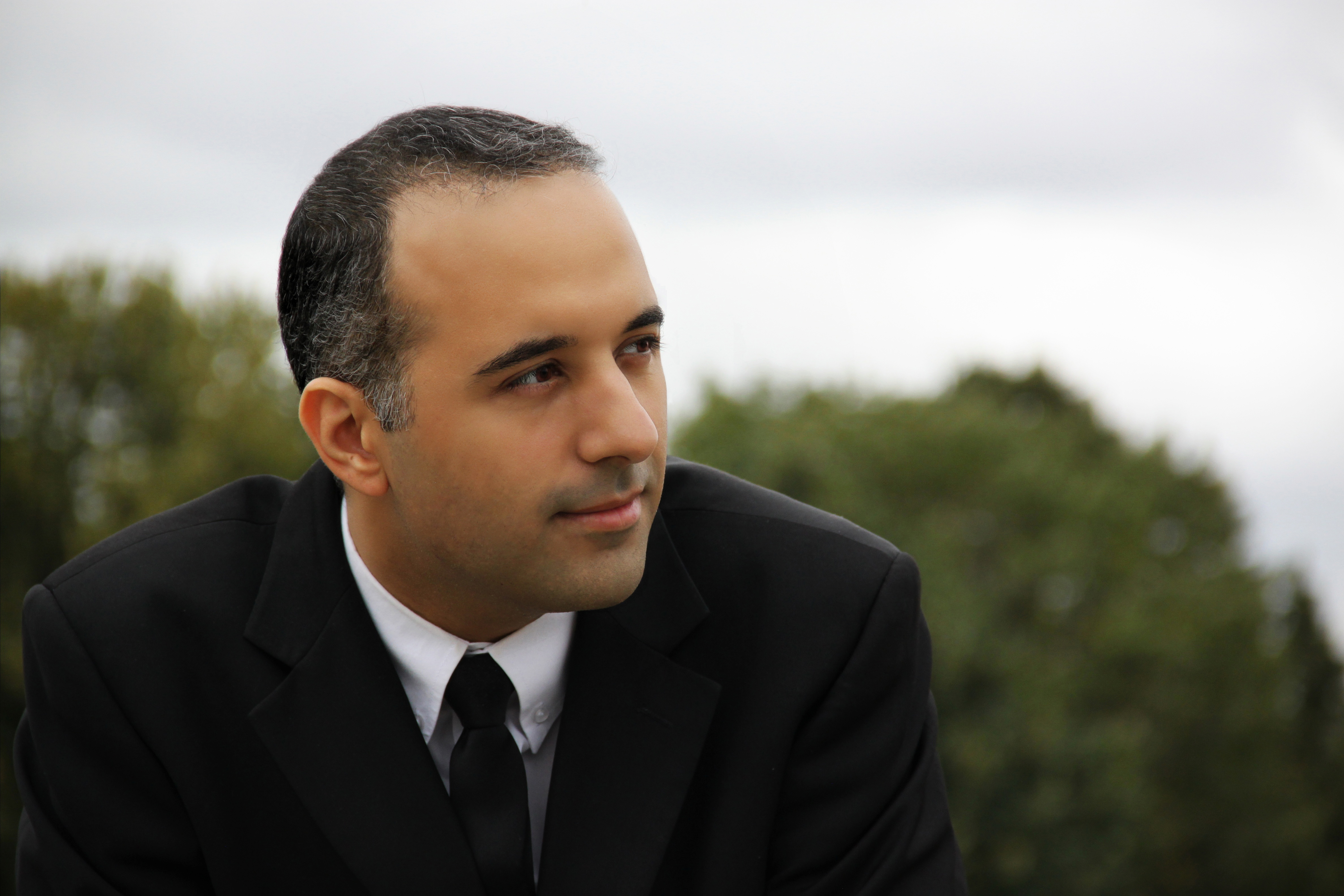 Farid Dms Debah